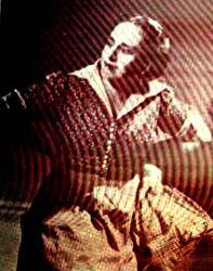 MariaTereza3